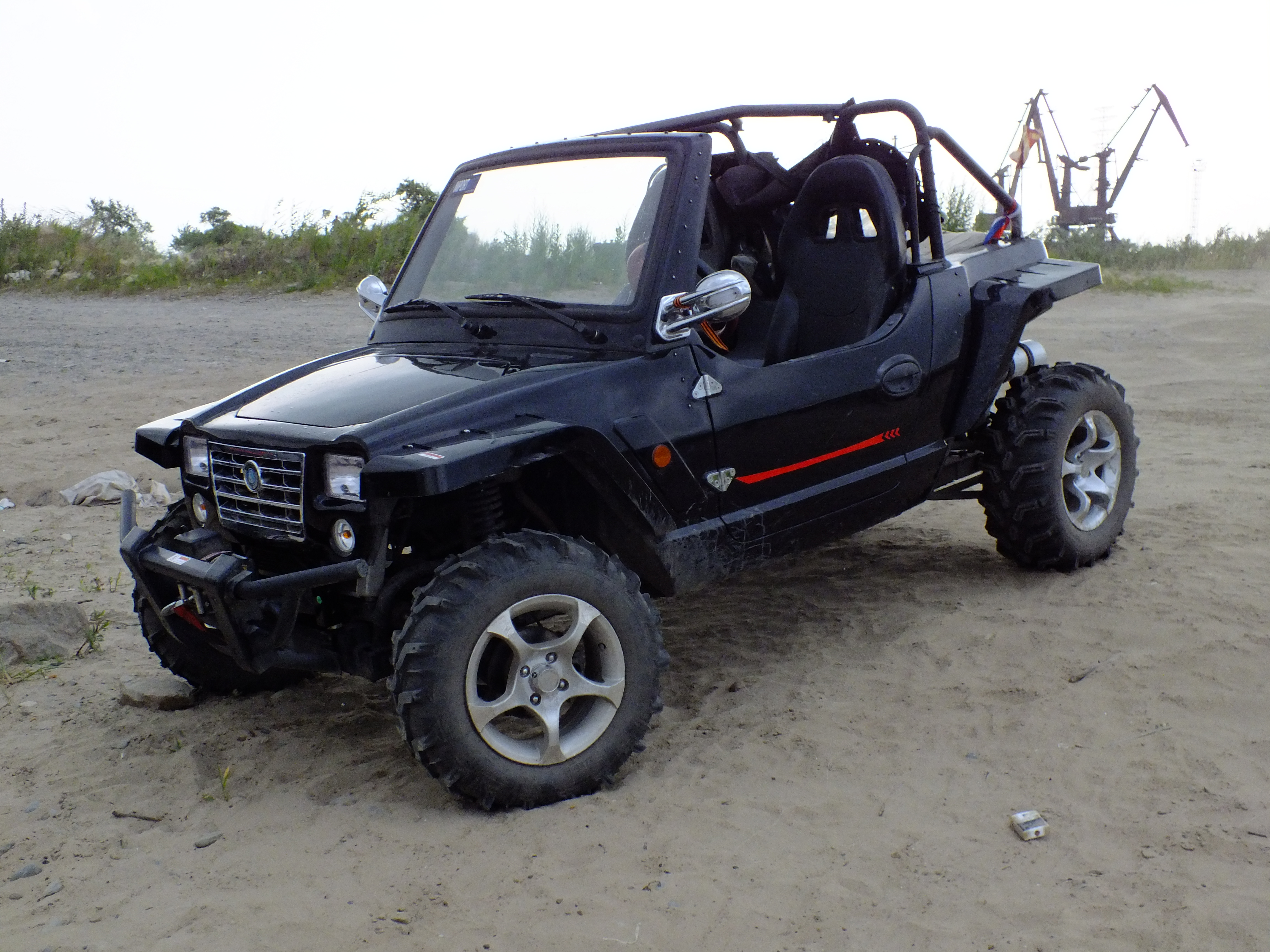 Side-by-side в Хабаровске